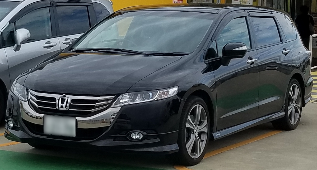 オデッセイ アブソルート（後期型）